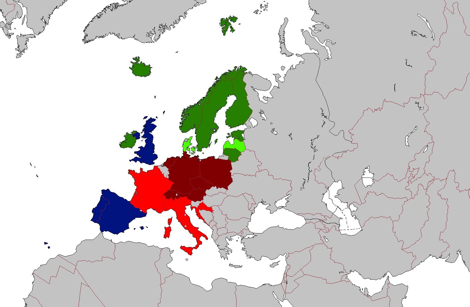 English (en): Distribution of the Anglican Communion, the Porvoo Communion and the Union of Utrecht (Old Catholic) No information Union of Utrecht Member churches Dependent jurisdictions Porvoo Communion Member churches Churches with observer status Anglican Communion Member churches Deutsch (de): Verteilung der Anglikanischen Gemeinschaft, der Porvoo-Gemeinschaft und der Utrechter Union (Altkatholische Kirche) Keine Angaben Utrechter Union Mitgliedskirchen Unselbstständige Kirchen Porvoo-Gemeinschaft Mitgliedskirchen Kirchen mit Beobachter-Status Anglikanische Gemeinschaft Mitgliedskirchen